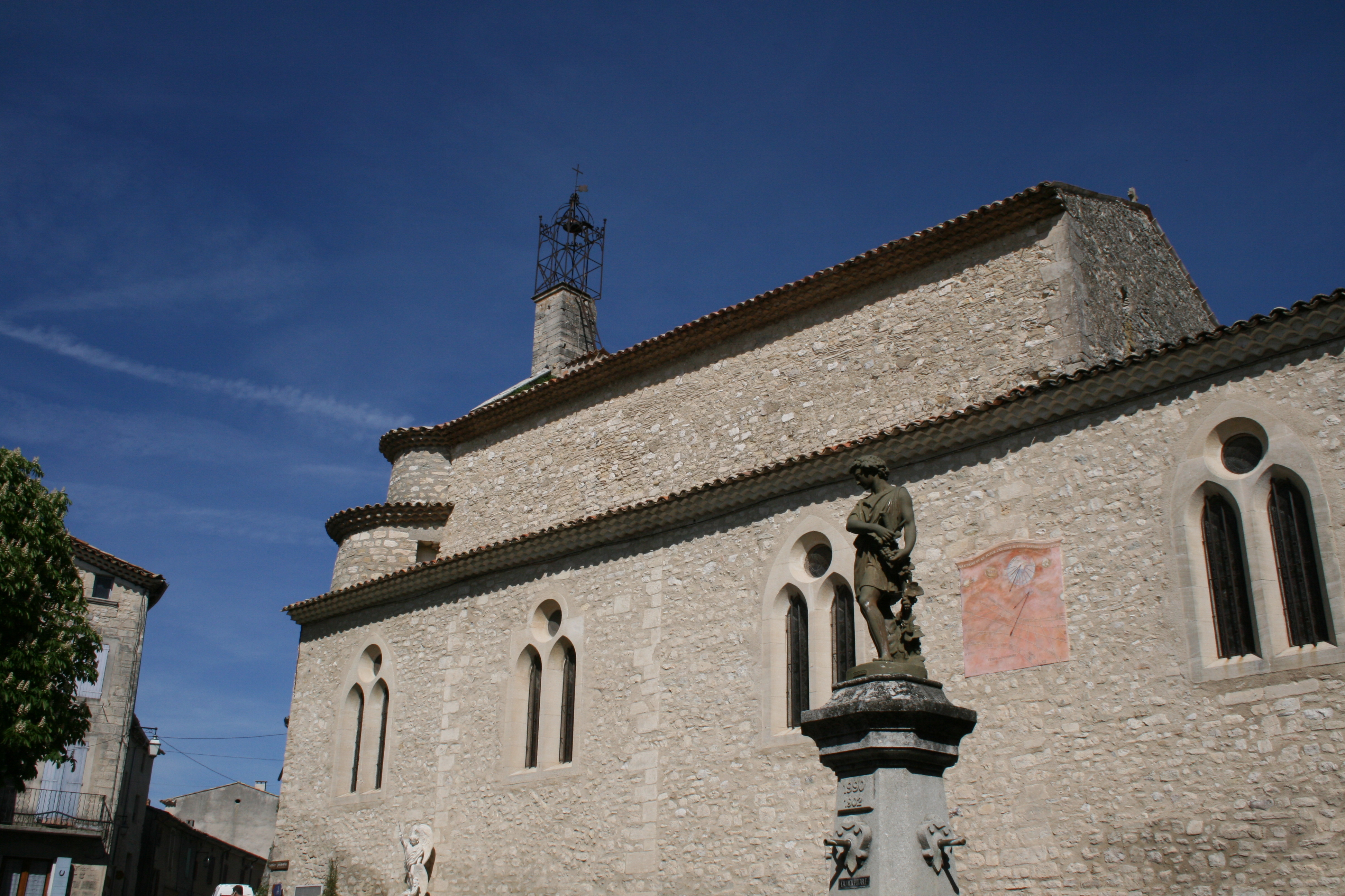 Saint-Michel l'Observatoire Eglise Saint-Pierre et fontaine surmontée d’une statue de Mathurin Moreau, Le Moissonneur ou L’Été